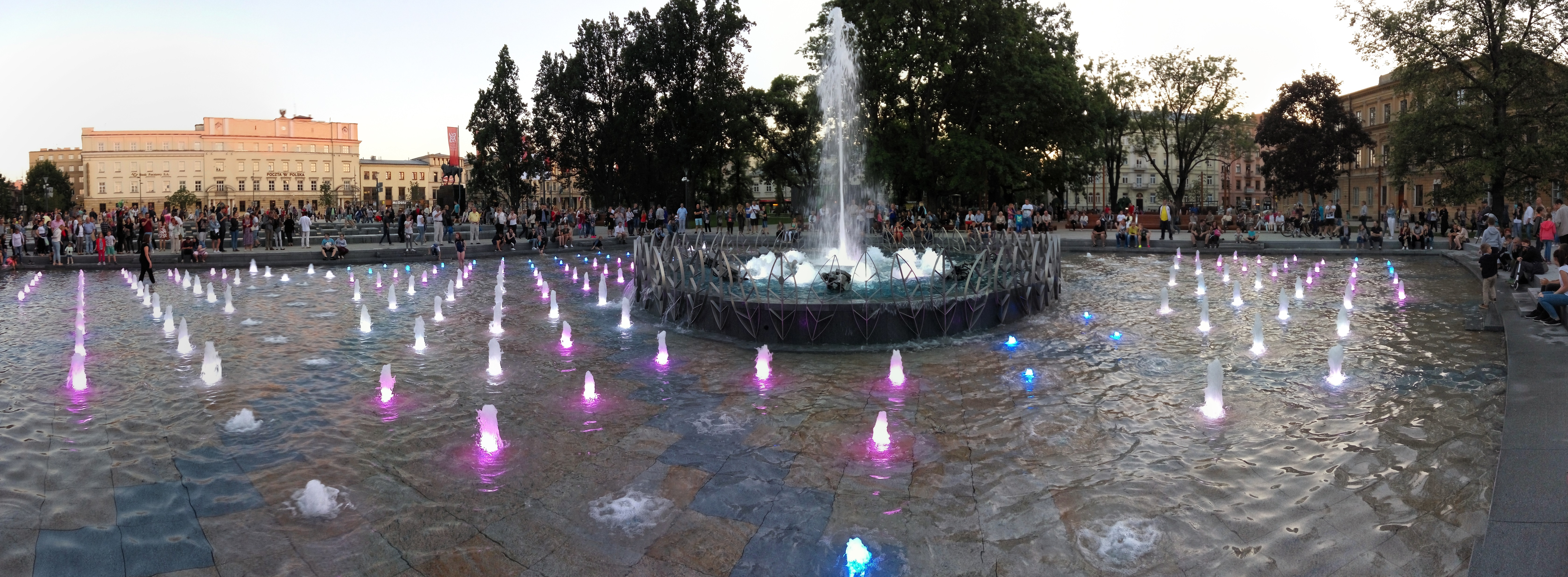 Fontanna na Placu Litewskim w Lublinie